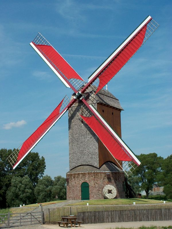 De Wullepitmolen.